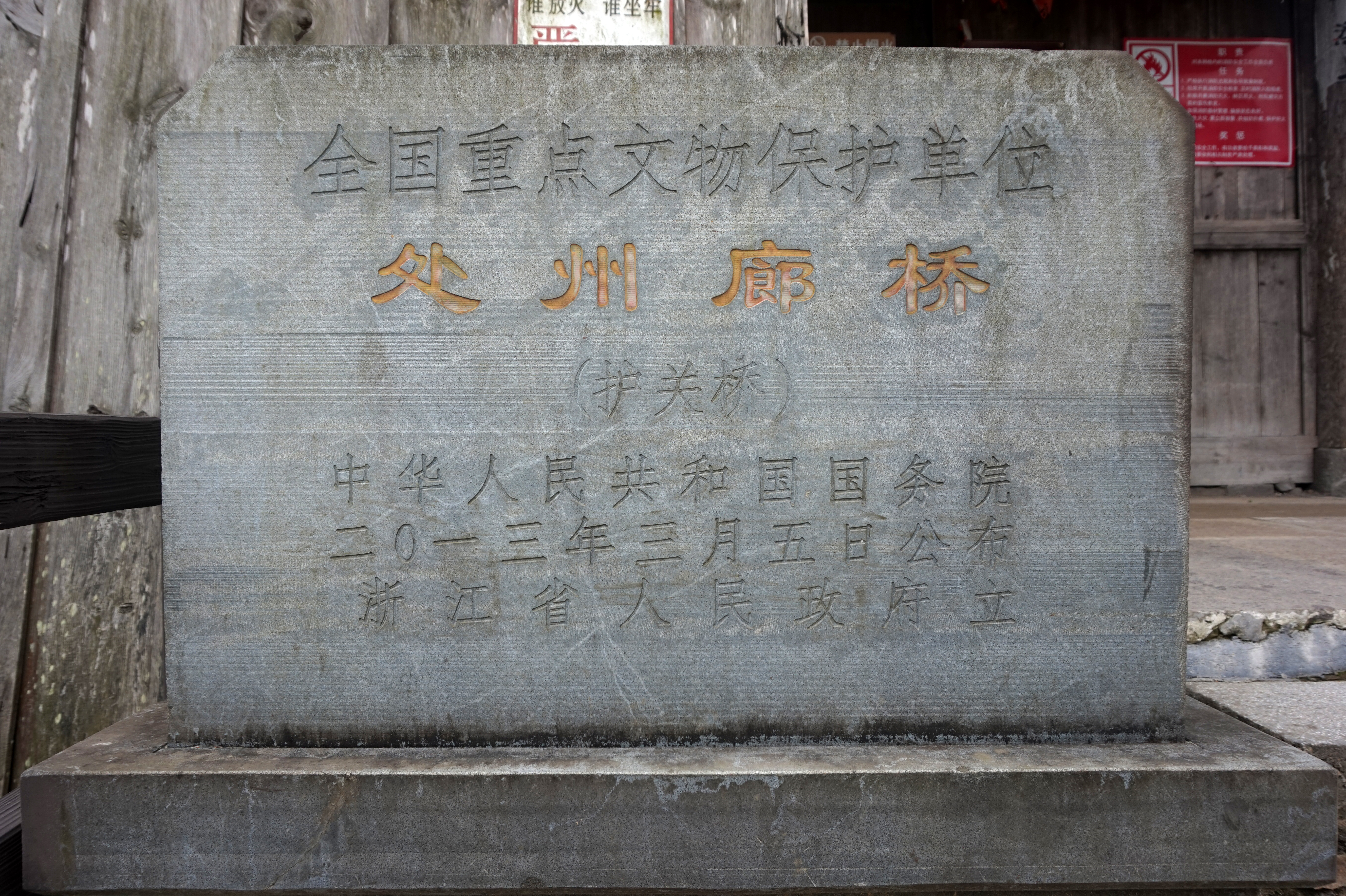 处州廊桥国保立碑（护关桥）。